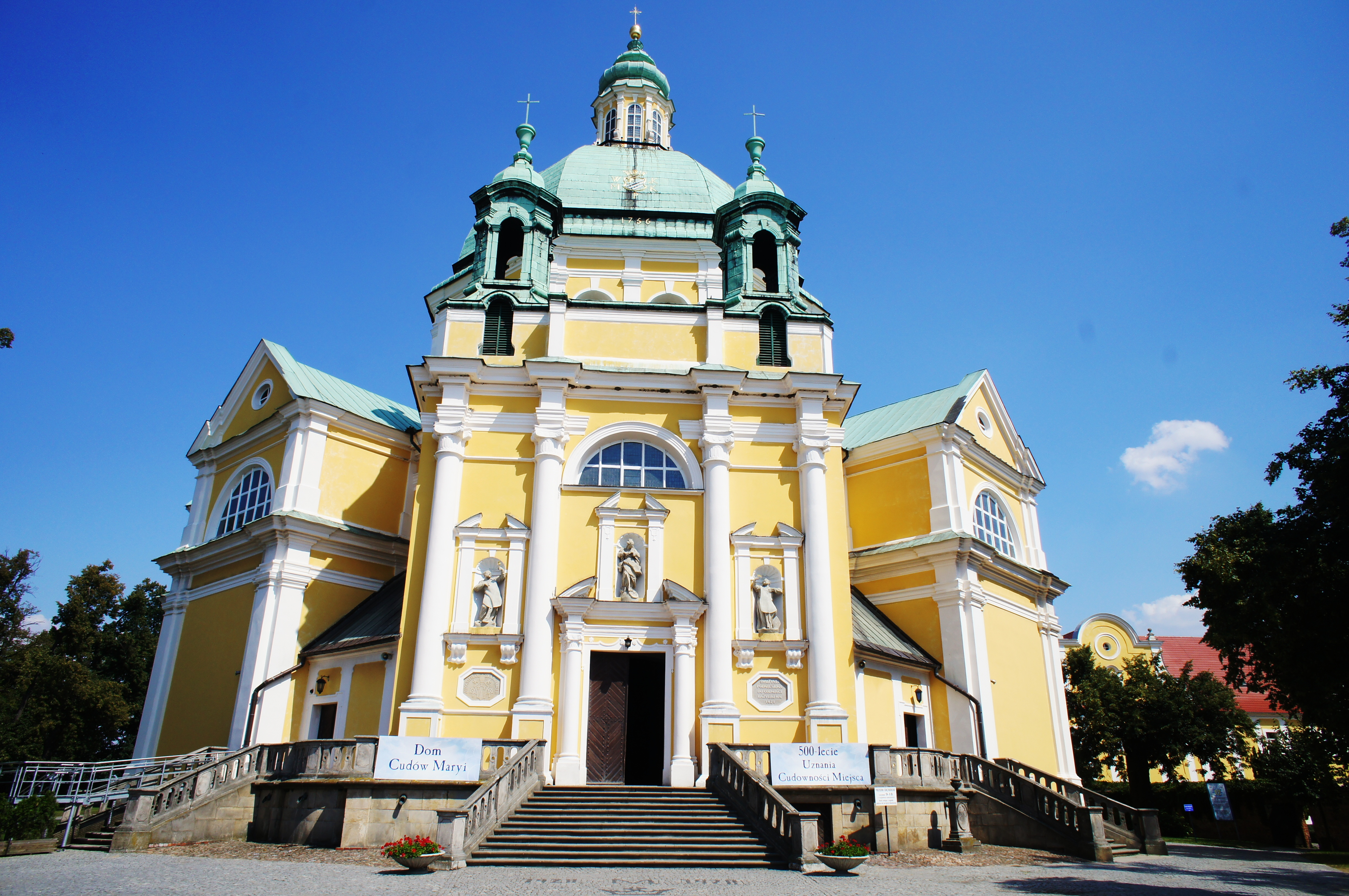 Zespół klasztorny filipinów kościół pw. Nawiedzenia NMP i św. Filipa Nereusza Gostyniu, Święta Góra, woj. wielkopolskie, powiat gostyński 570 -Magkrys